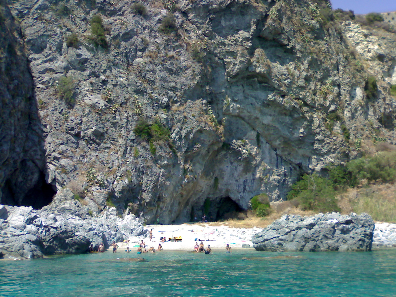 L'imponente scogliera della spiaggia di Caminia, località balneare nei pressi di Soverato, in provincia di Catanzaro. Si possono notare anche due grotte.